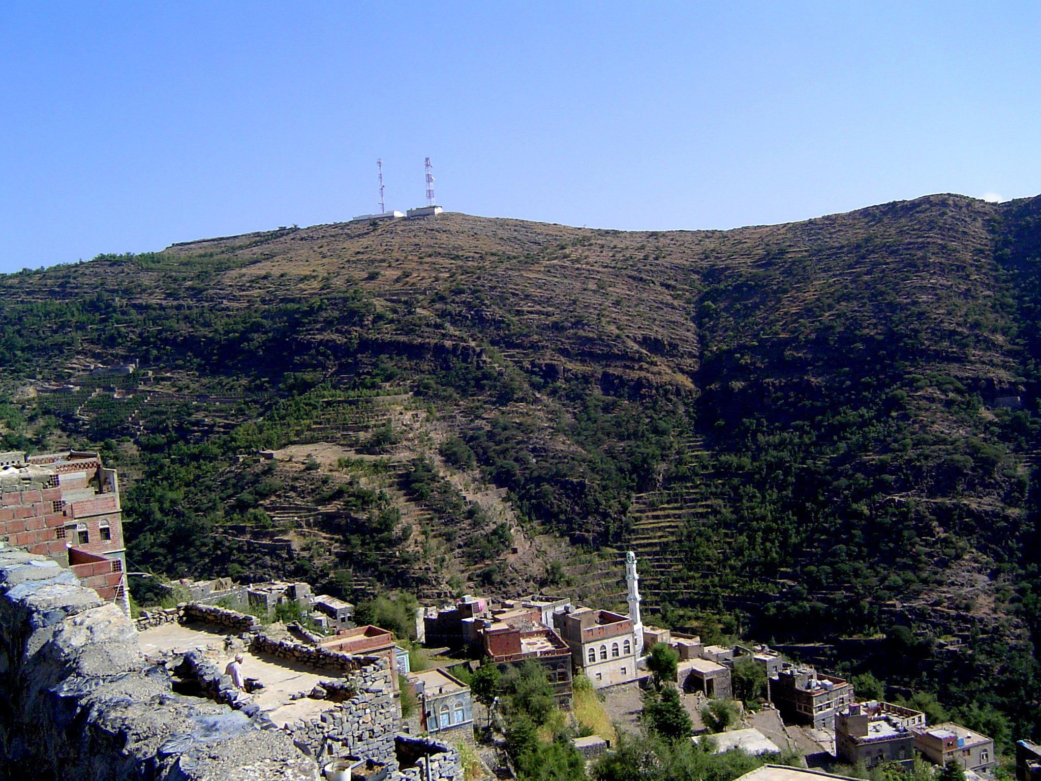 قرية الغول ـ جبل ميراب